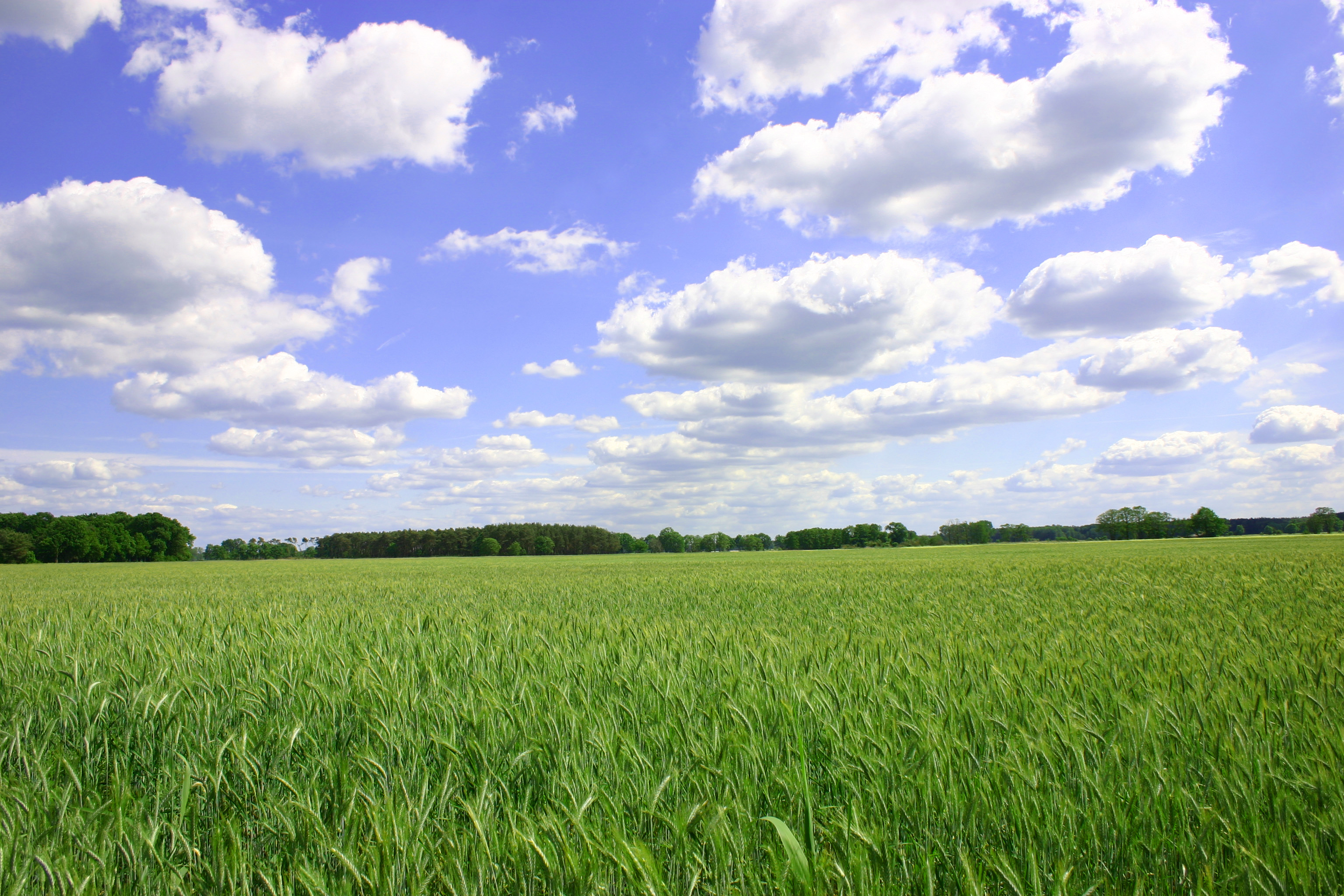 Grünes Roggenfeld im Frühling bei Sonnenschein